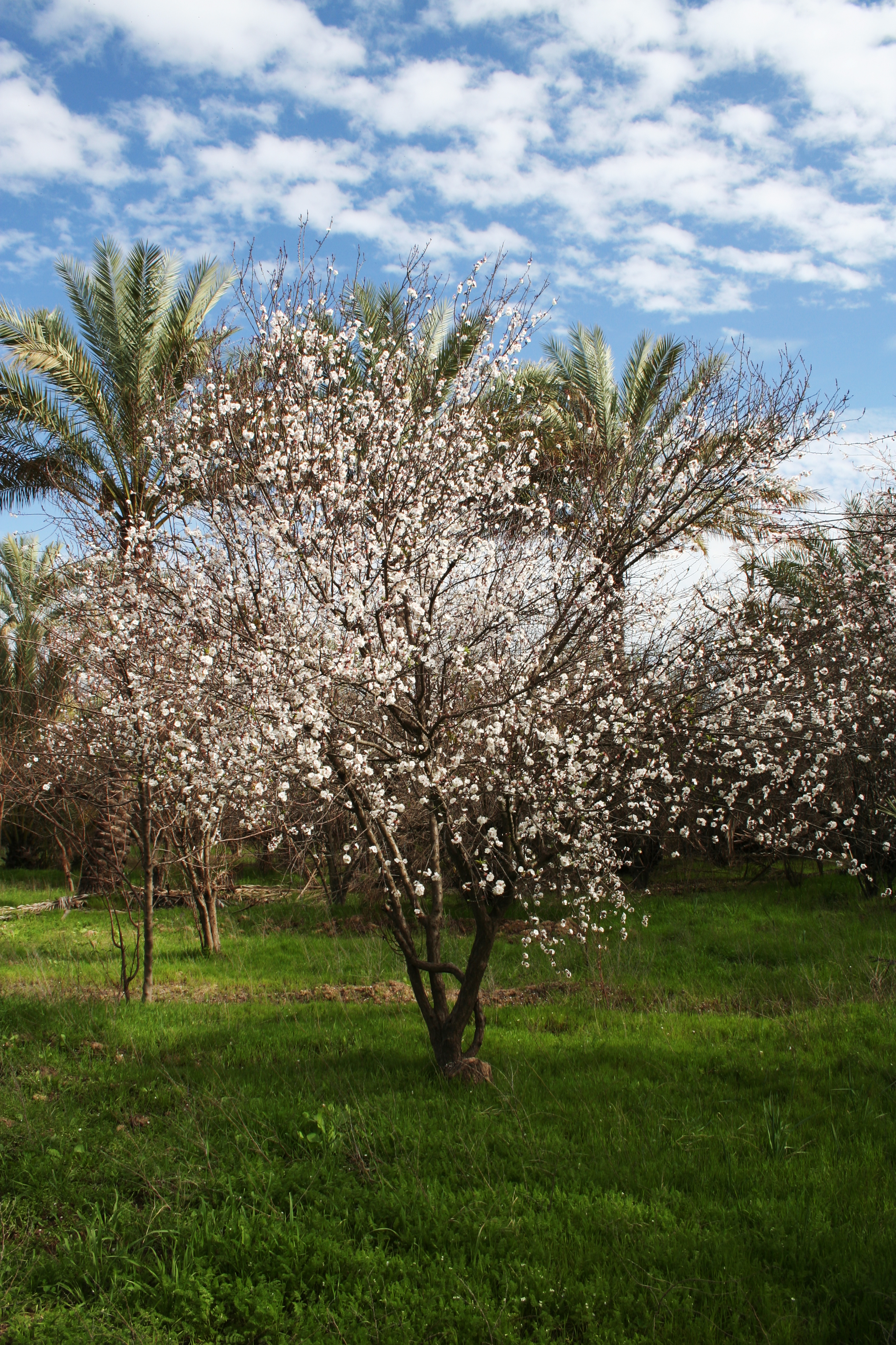 درخت خرما و زردآلو